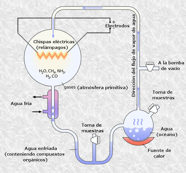 Esquema del dispositivo con el que se realizó el experimento de Stanley Miller y Harold Urey sobre la síntesis abiótica de biomoléculas.